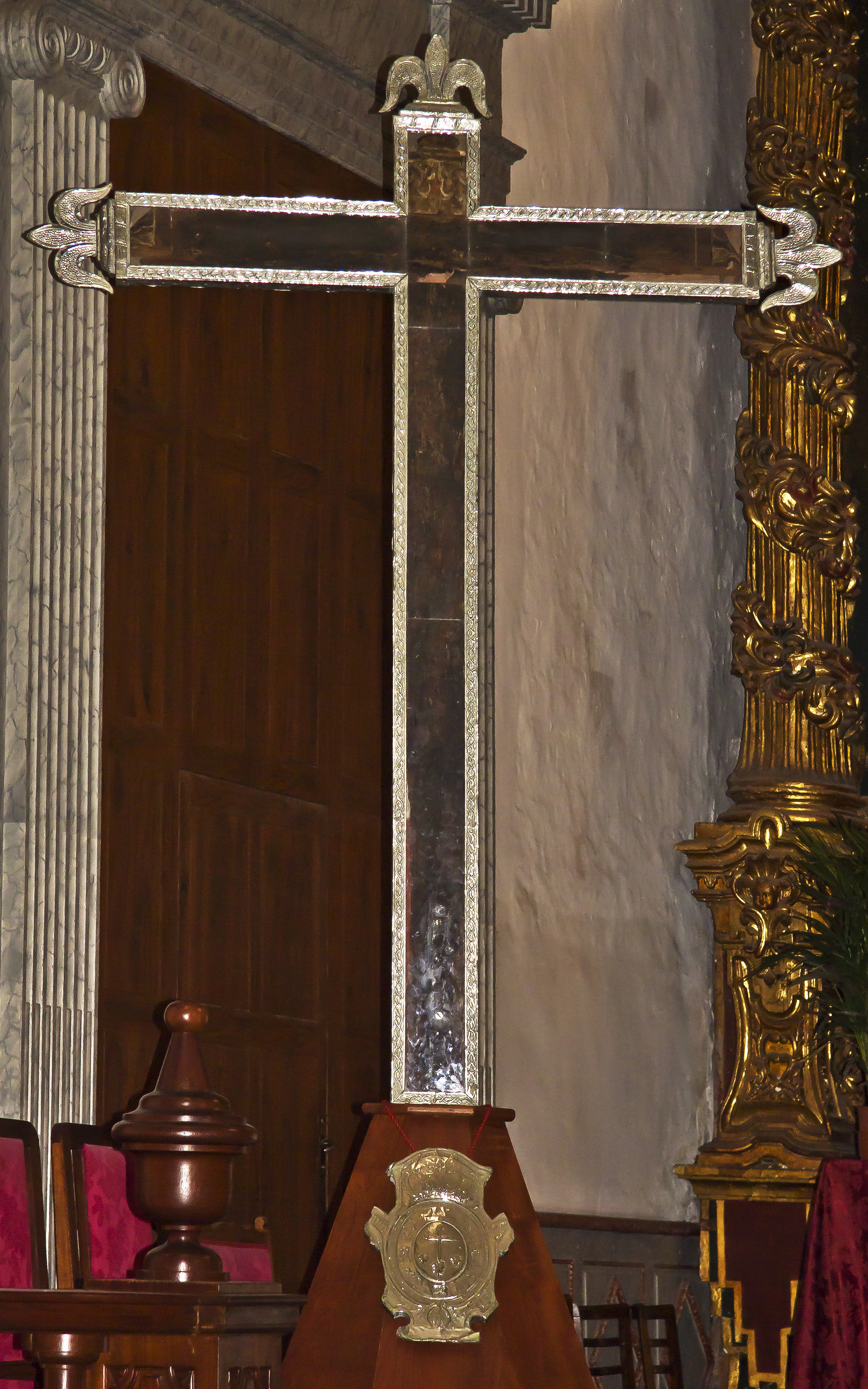 Das Kreuz, von dem angenommen wird, dass es innerhalb der Fassung das Kreuz ist, dass Alonso Fernandez de Lugo am Strand von Santa Cruz de Tenerife errichtet hat, befindet sich im Hauptaltarraum der Kirche Nuestra Señora de la Concepción in Santa Cruz de Tenerife.